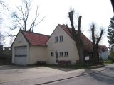 Feuerwehr Gerätehaus in Allmenrod im Jahr 2002